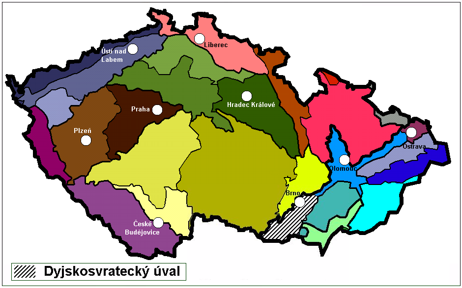 Dyjskosvratecký_úval